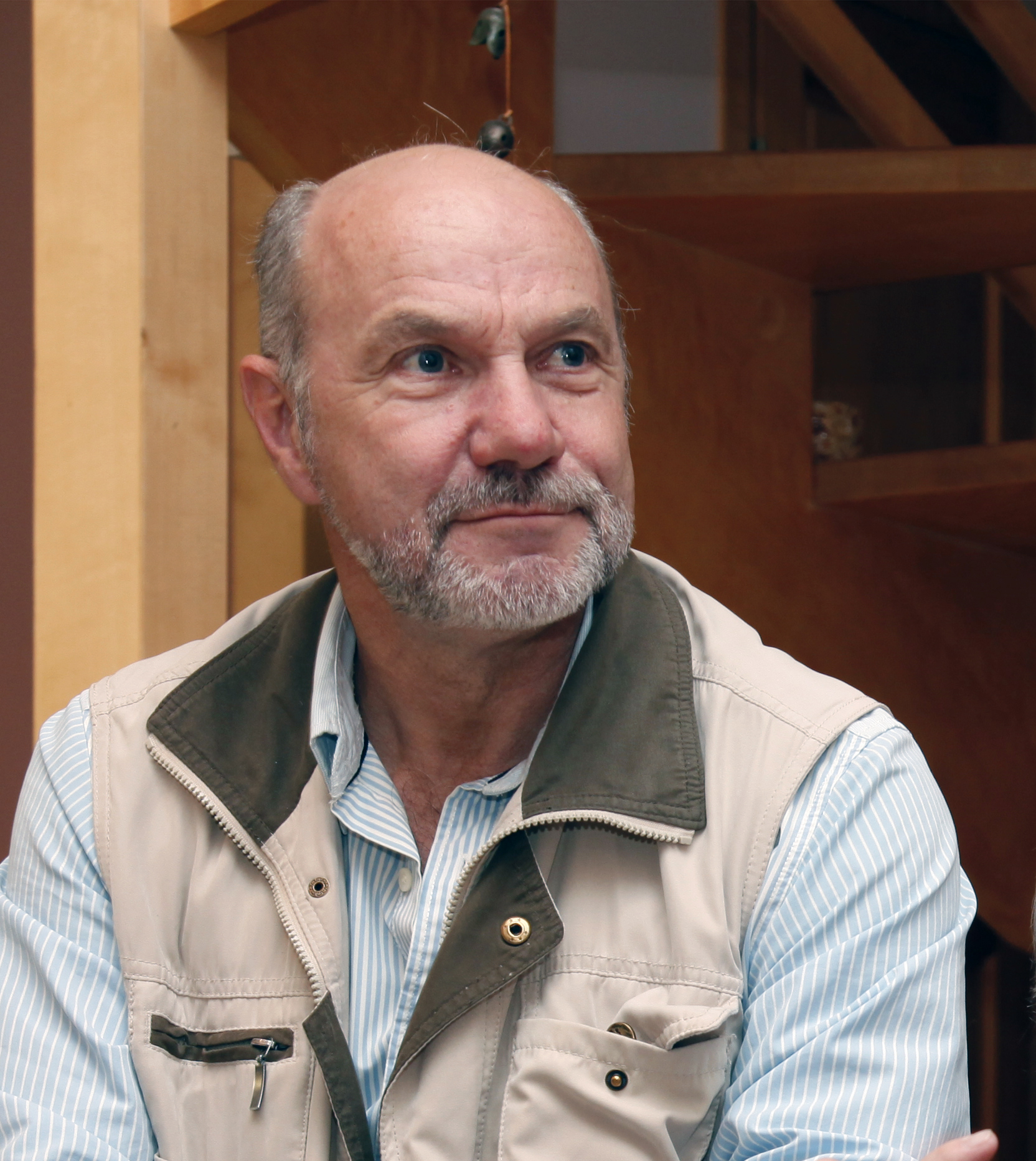 Urmas Grauen